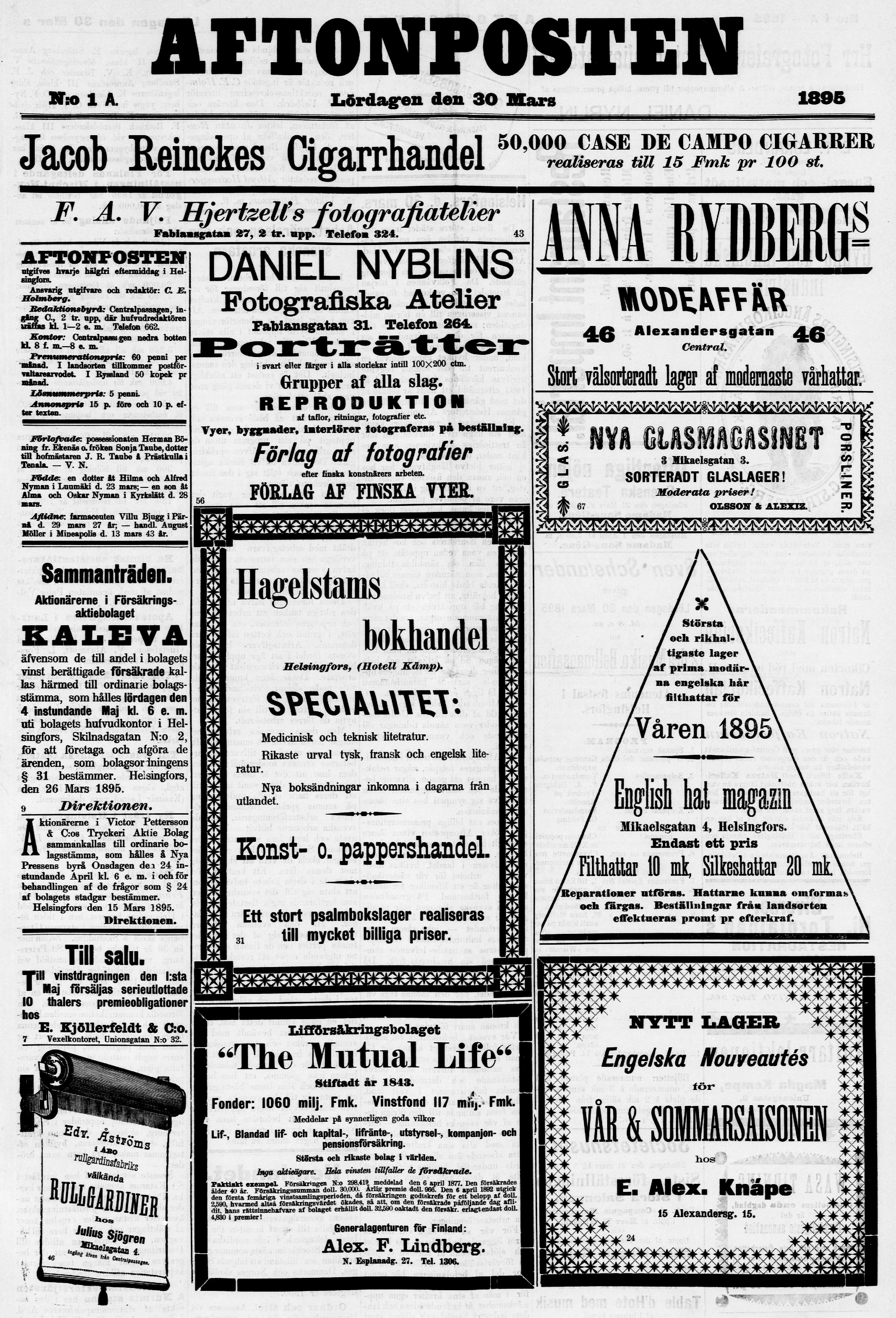 Första numret av Aftonposten, del A